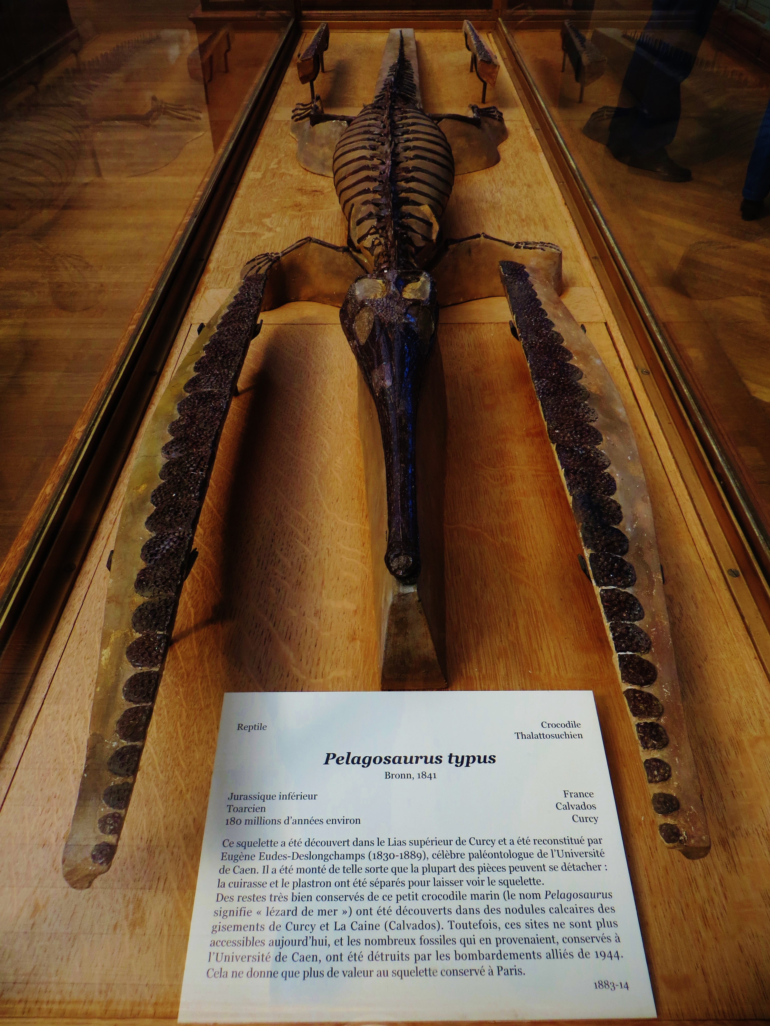 Fossil of Pelagosaurus, an extinct reptile- Took the photo at Musee d'Histoire Naturelle, Paris